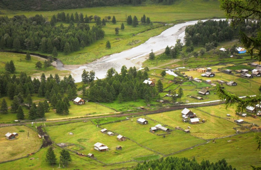 Далахай. Вид с горы